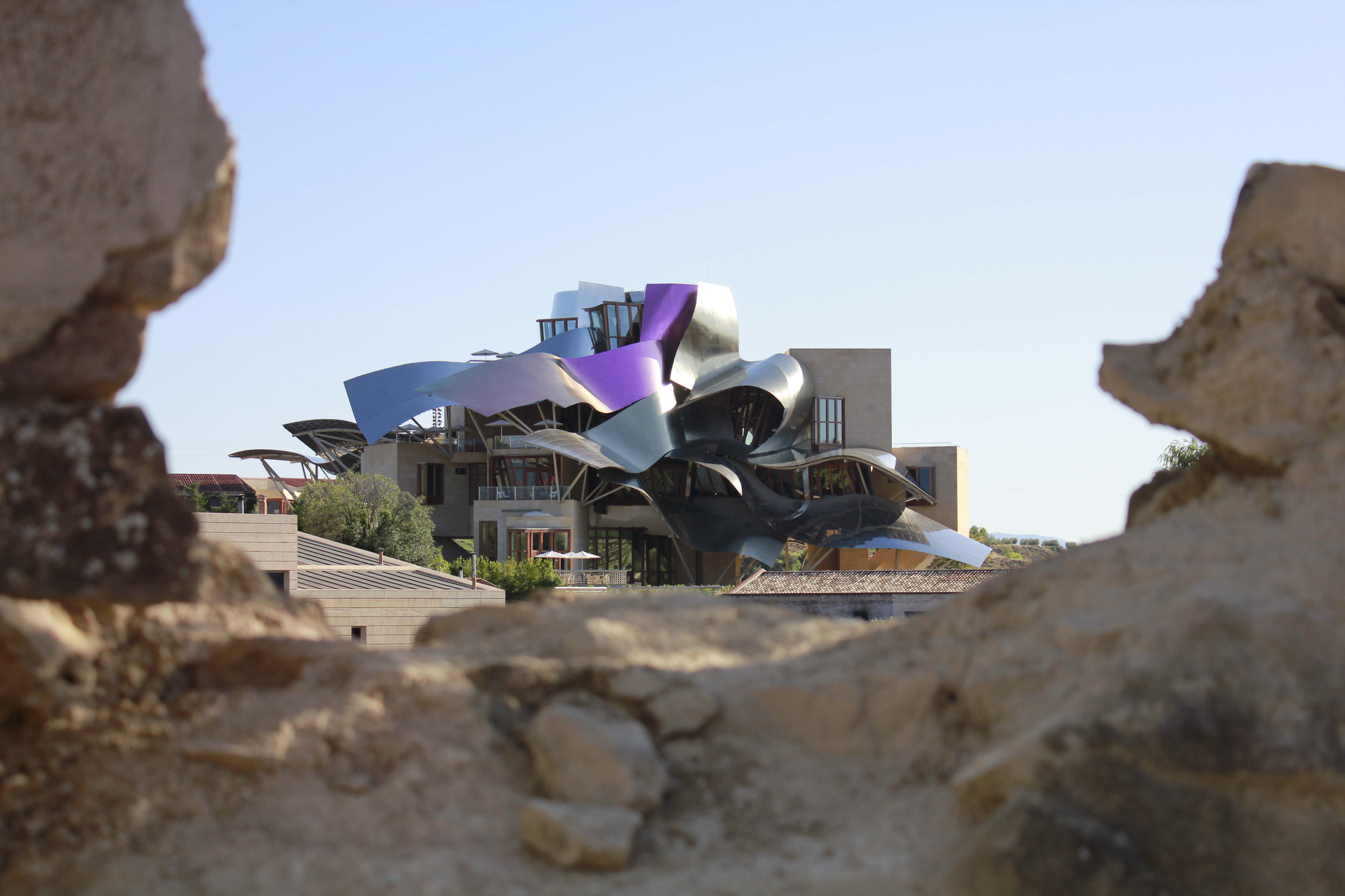 HOTEL MARQUES DE RISCAL